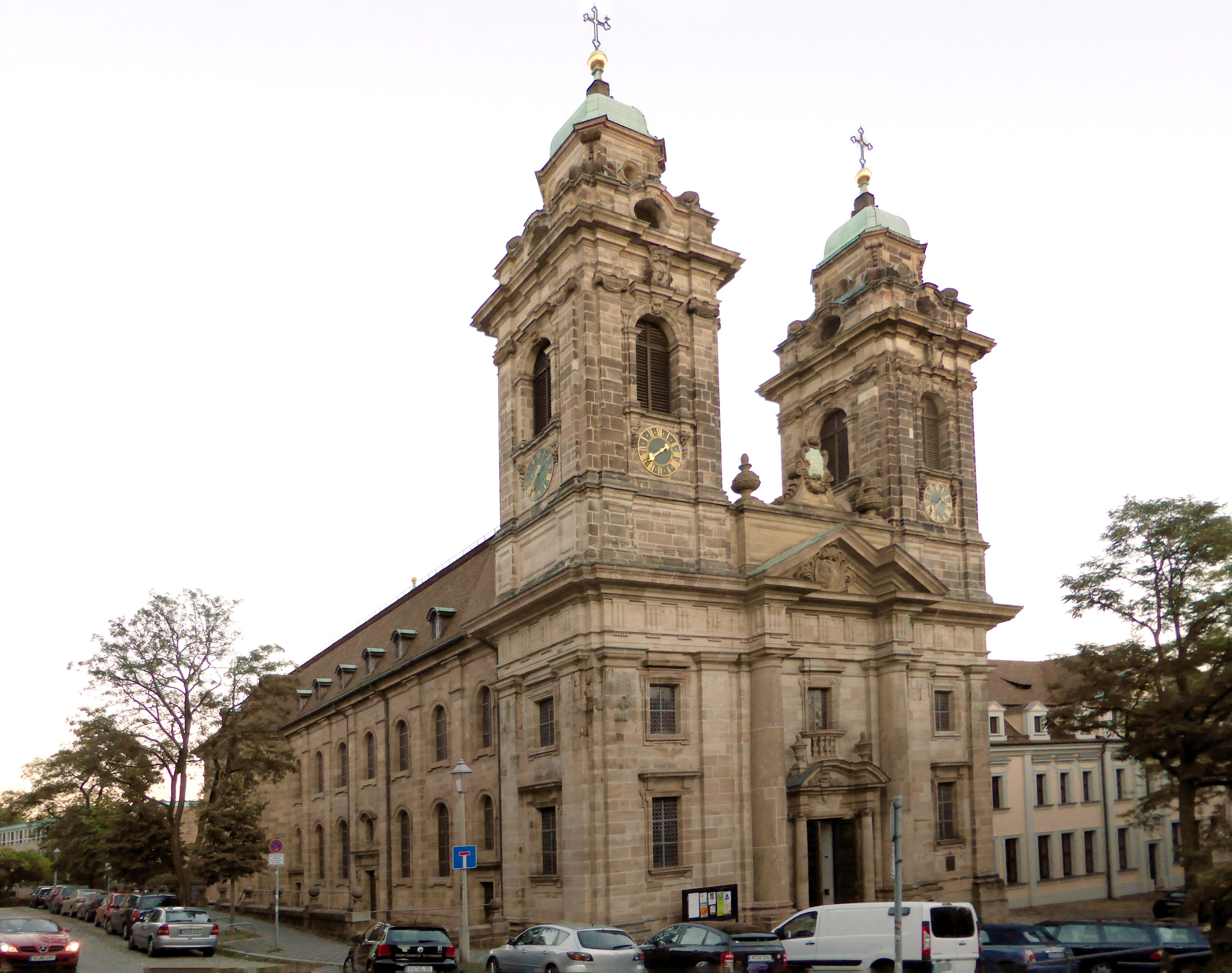 Germany, Bayern, Nuremberg St. Egidien